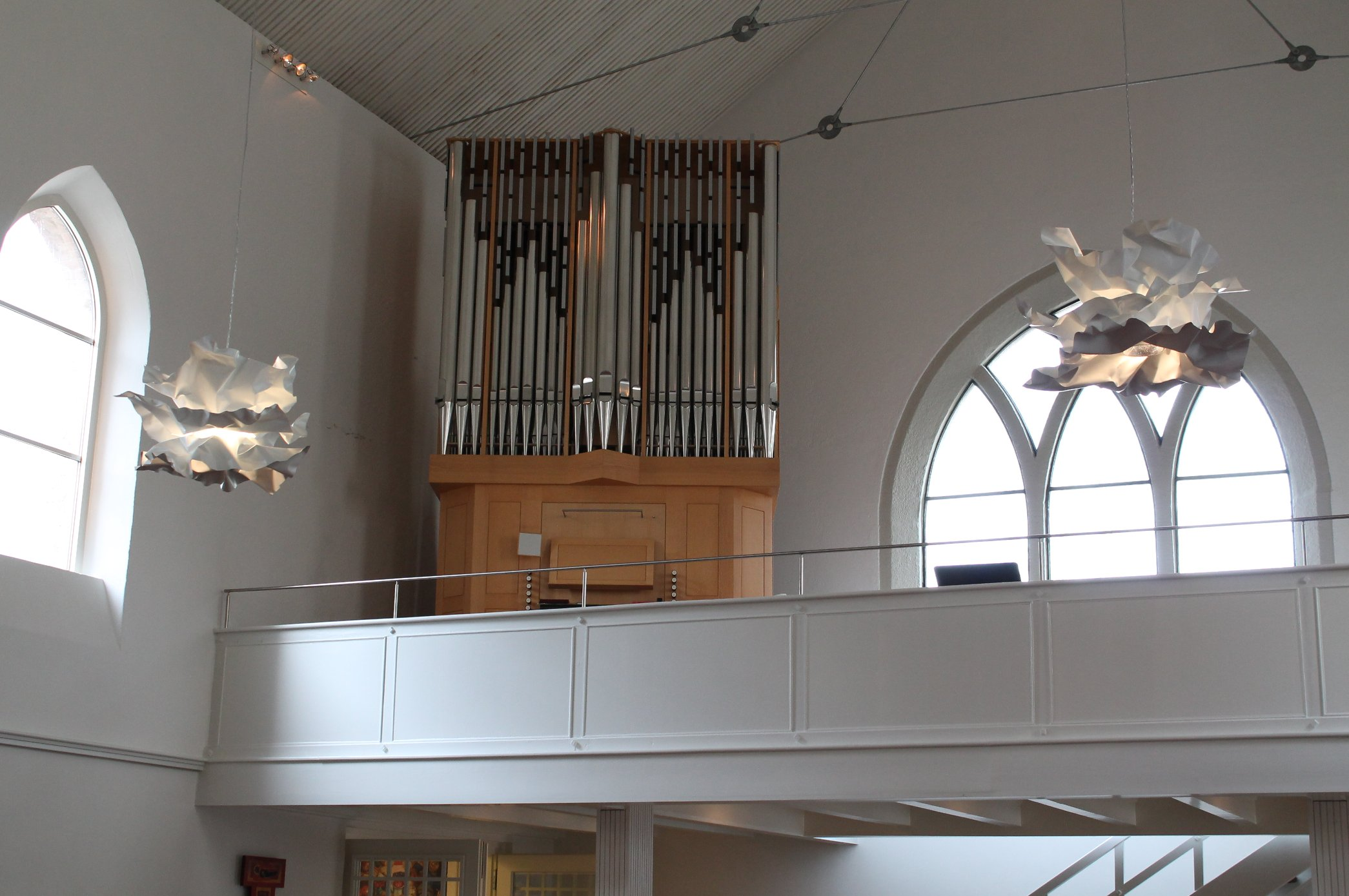 Orgel von St. Willibrord in München (2007, Gunnar Schmid, II/15)